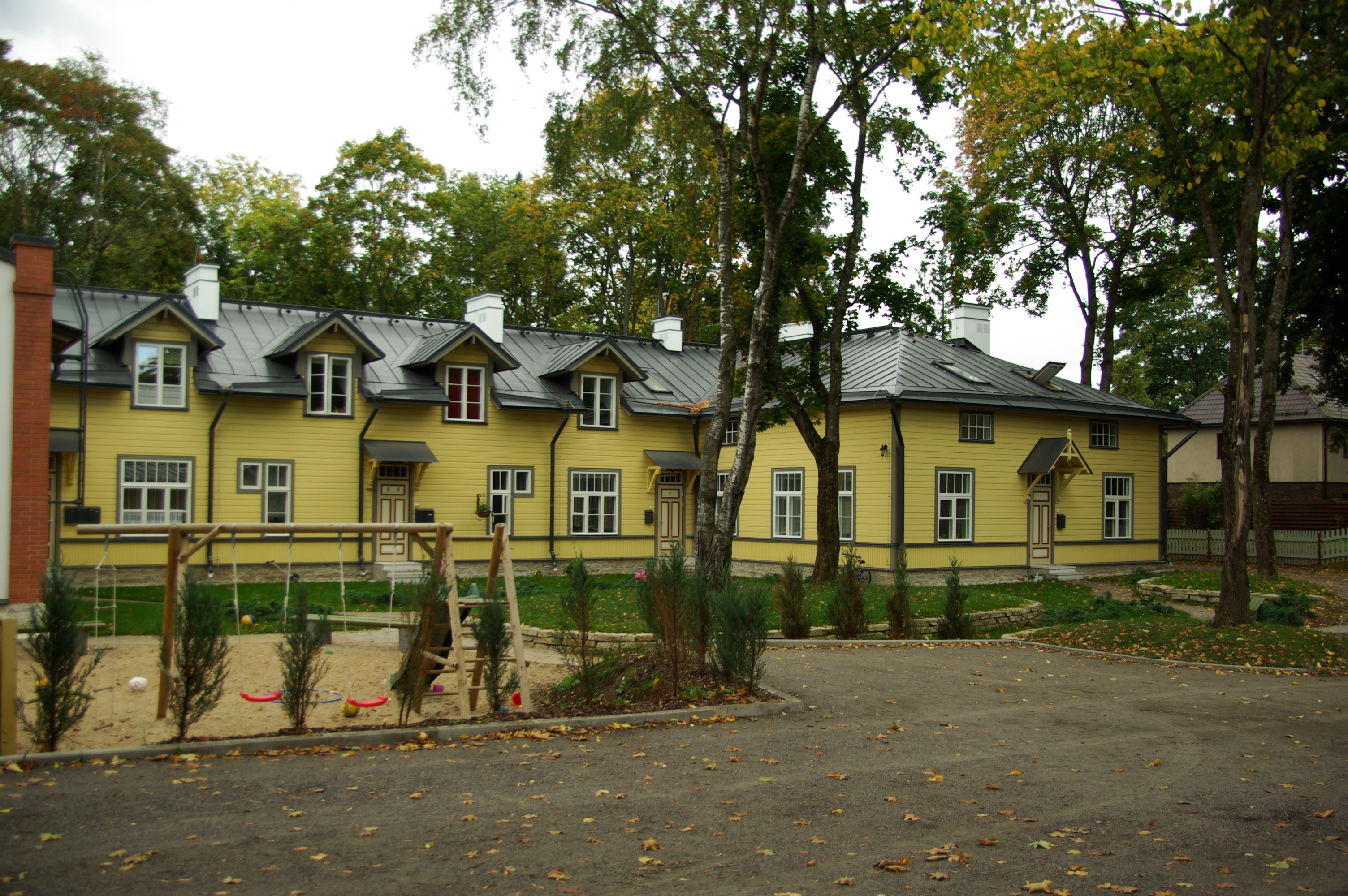 Harju maakond, Tallinna linn, Nõmme linnaosa